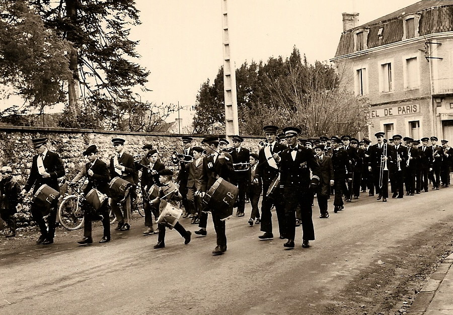 Jaligny-sur Besbre (France) - La Fanfare de la Besbre au début des années 1960 Collection personnelle